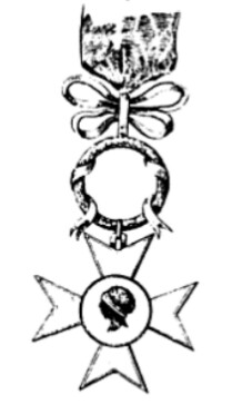 Order Moretta